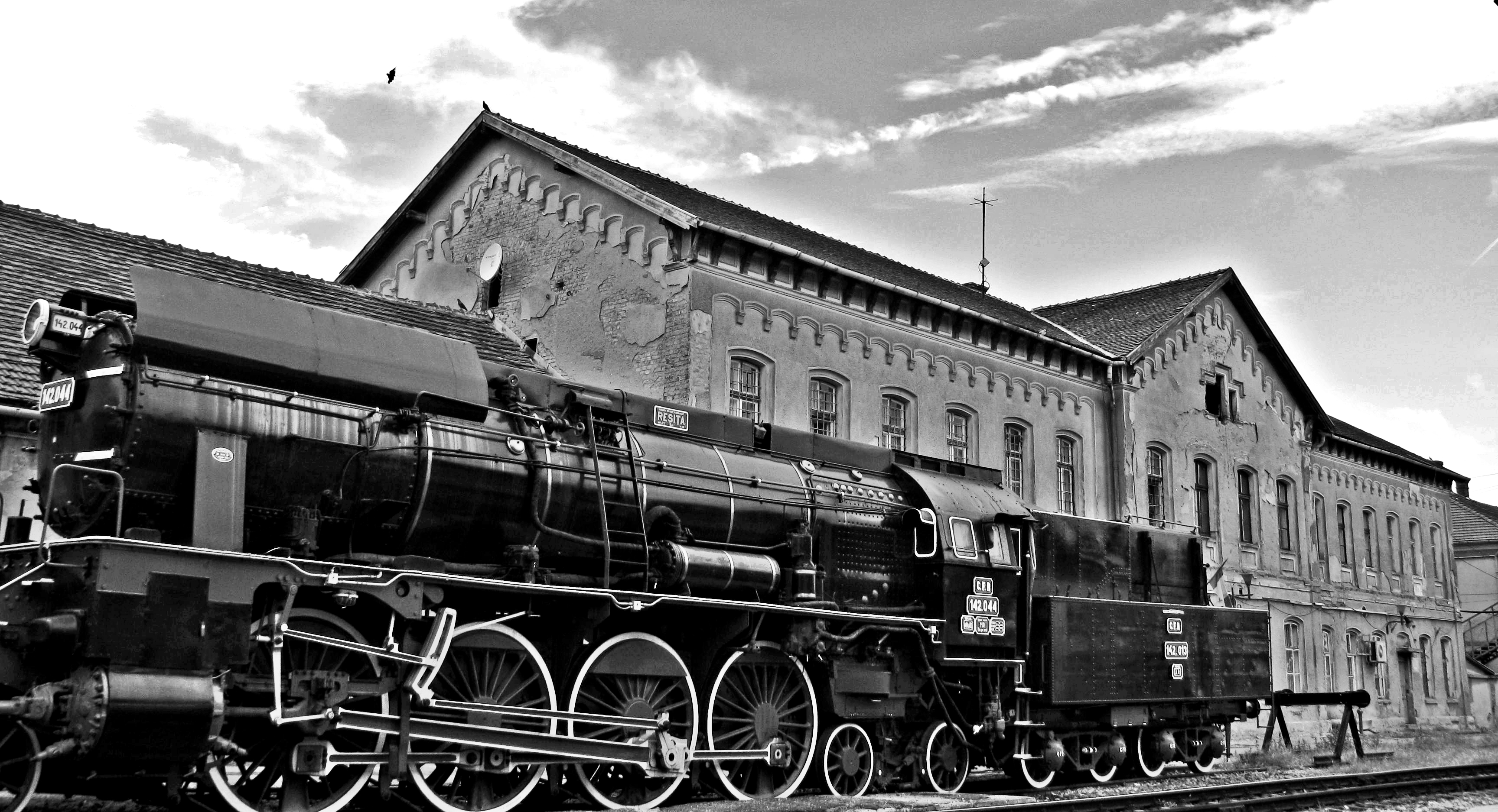 Cladire din ansamblul garii CFR